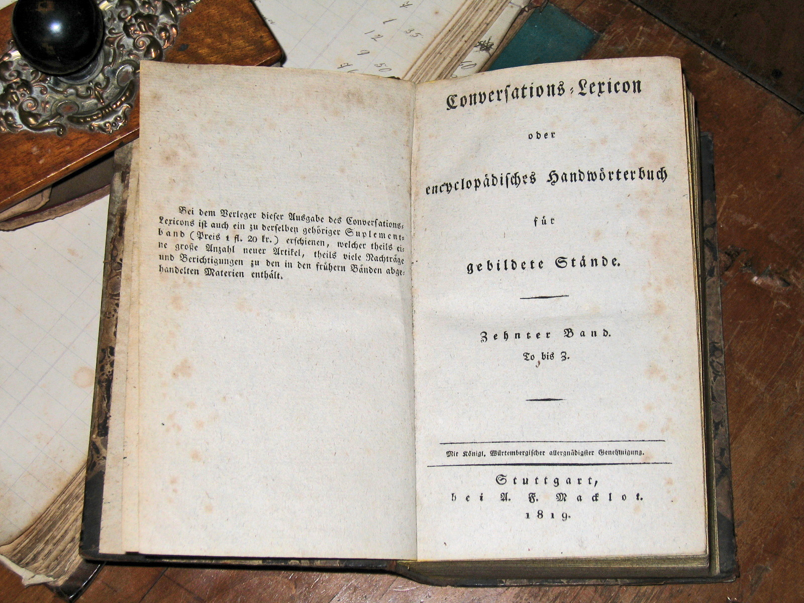 Konversationslexikon (Enzyclopädisches Handwörterbuch für gebildete Stände aus dem Jahr 1819, Band 10) im Heimatmuseum in Meschede-Eversberg.